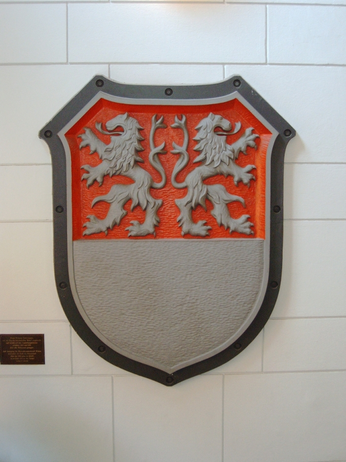 Wappen der Stadt Witten im Treppenhaus des Rathauses